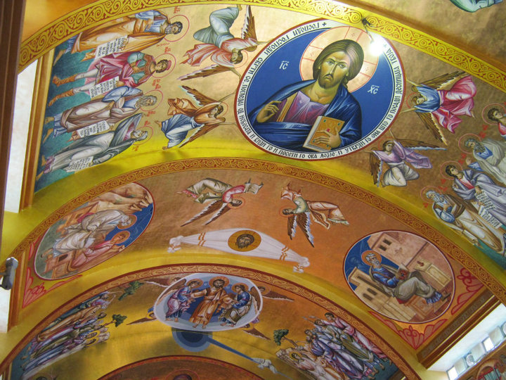 Католичка црква Успение на Пресвета Богородица - Струмица